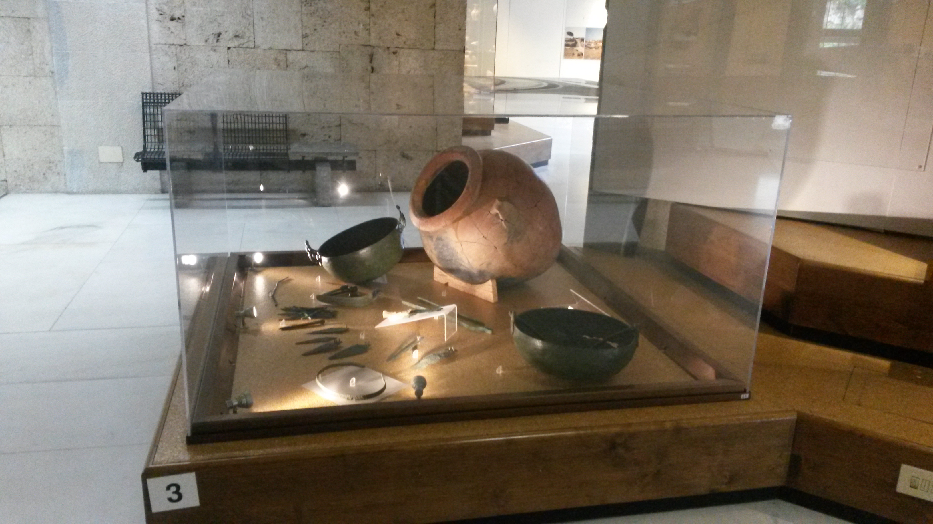 Museo Archeologico Nazionale di Cagliari This is a photo of a monument which is part of cultural heritage of Italy.